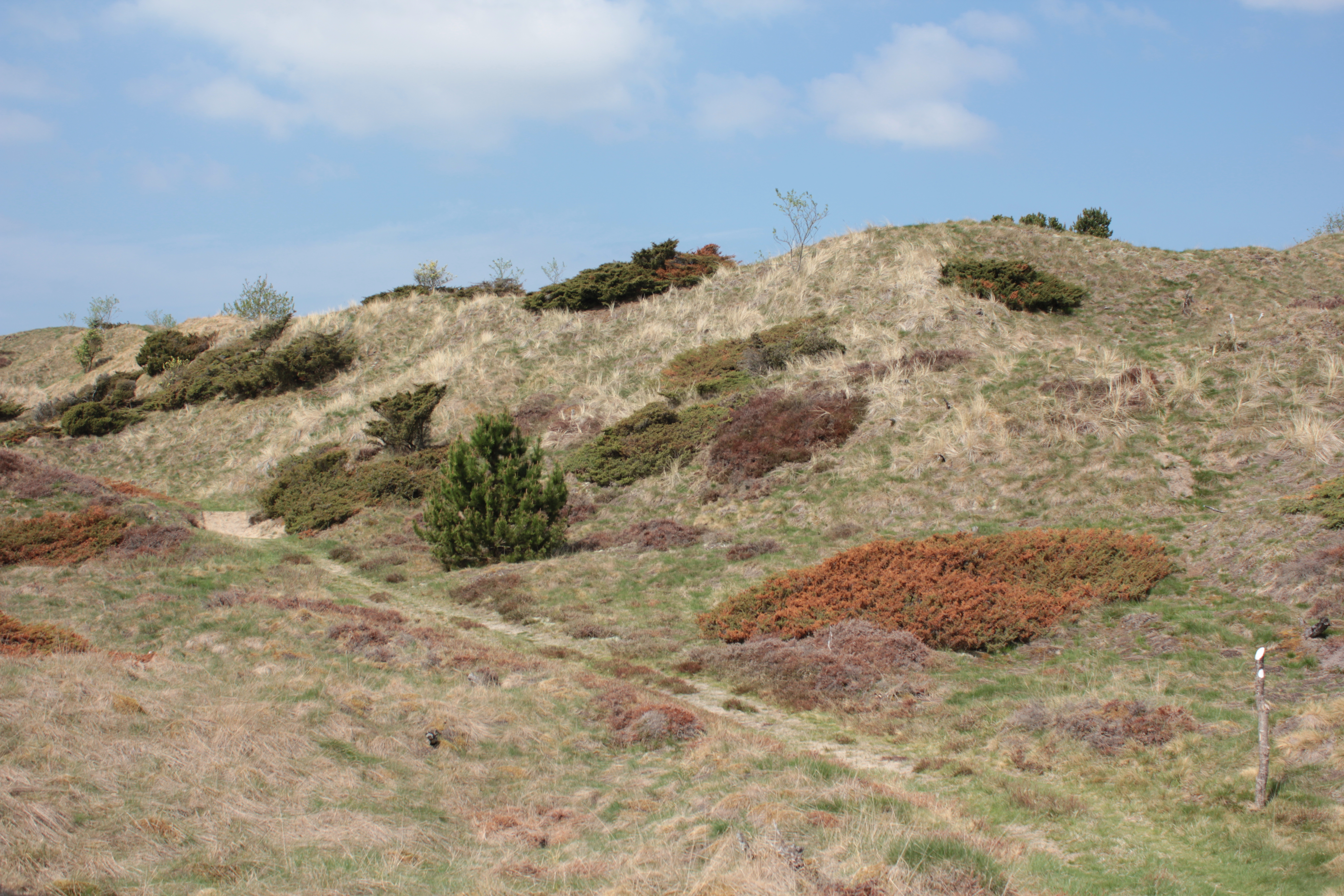 Tranum Aktieplantage